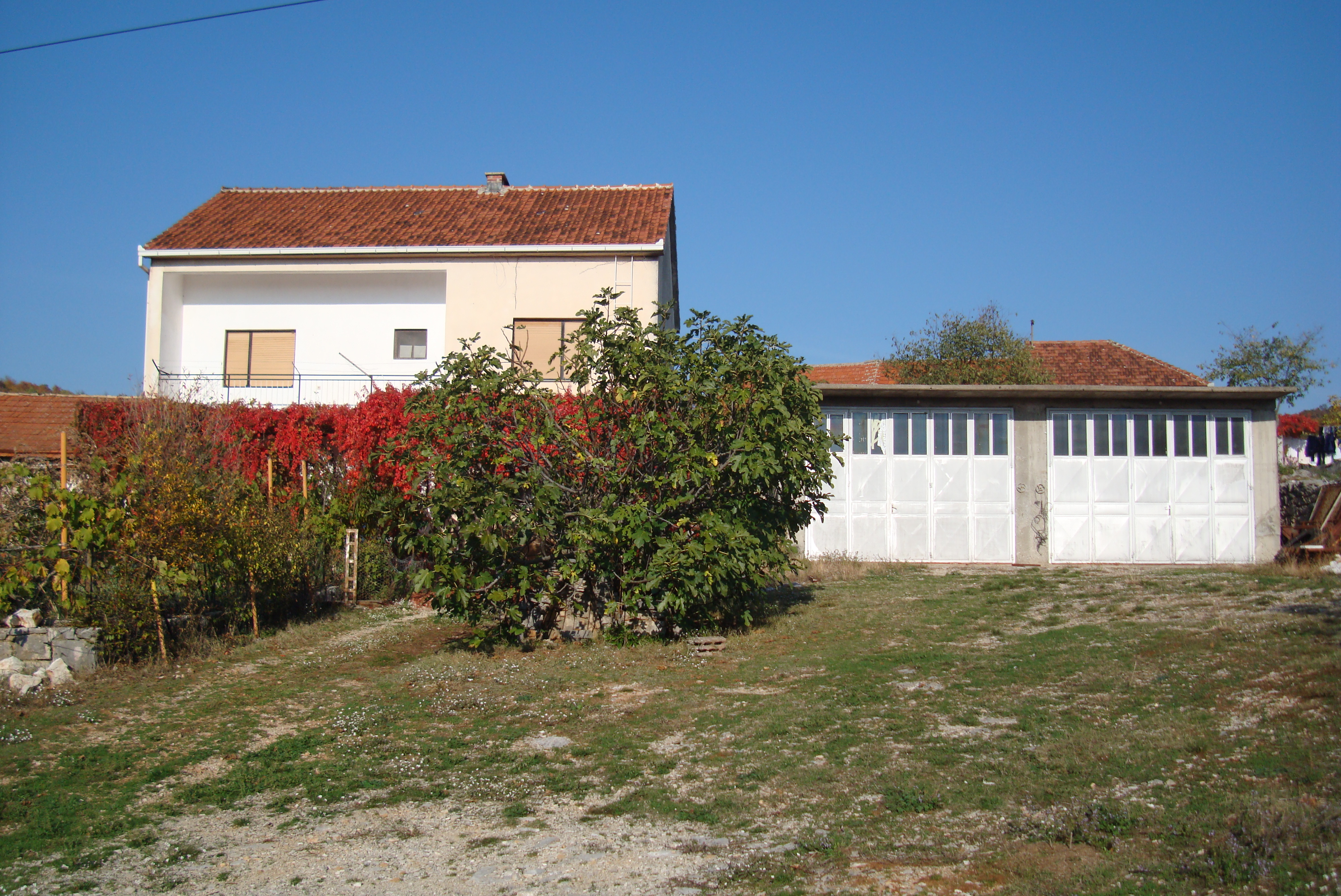 Bazilije Stjepan Pandžić --- Drinovci --- Place of birth / Geburtsort --- Family seat / Familiensitz